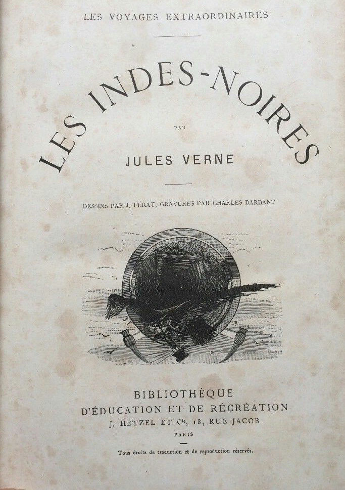 Les Indes noires de Jules Verne, éd. Hetzel 1877.